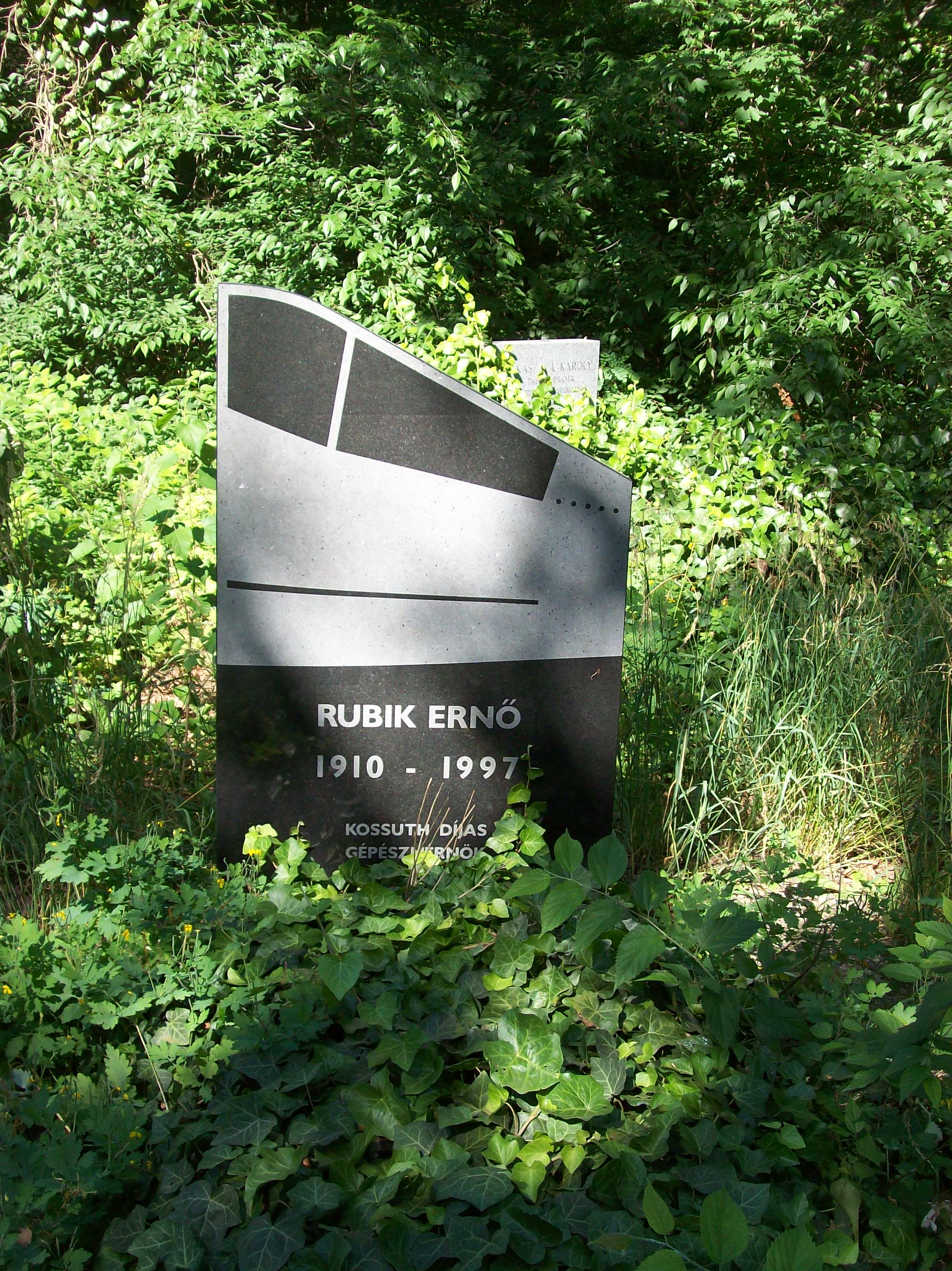 Rubik Ernő (1910-1997) új síremléke (Budapest-Józsefváros)